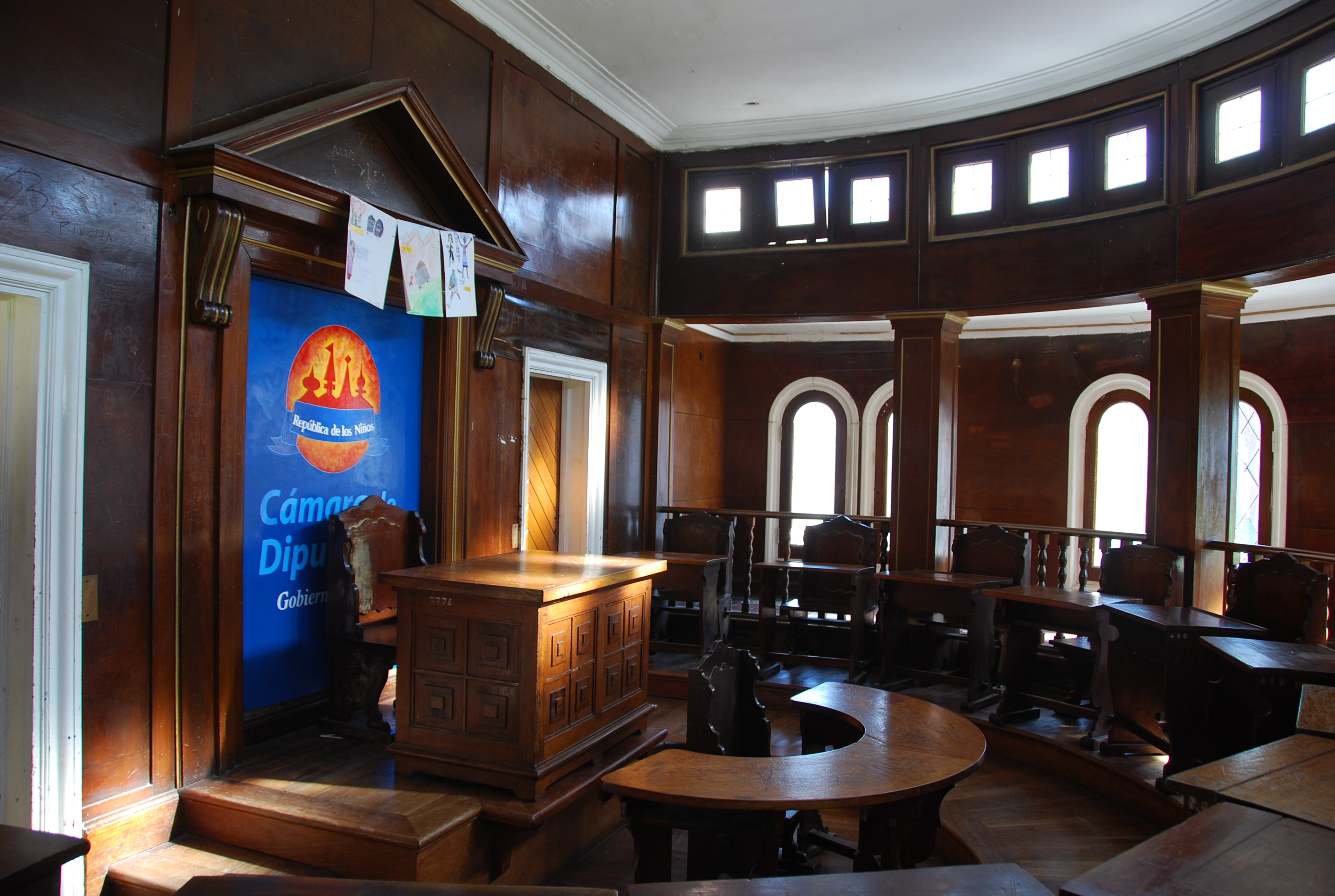 República de los Niños